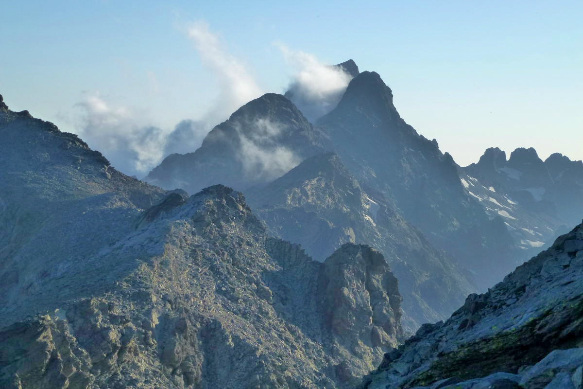 Monte Cinto depuis les environs de Capu Biancu